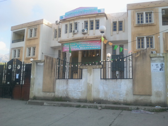 Tizi N'Tleta